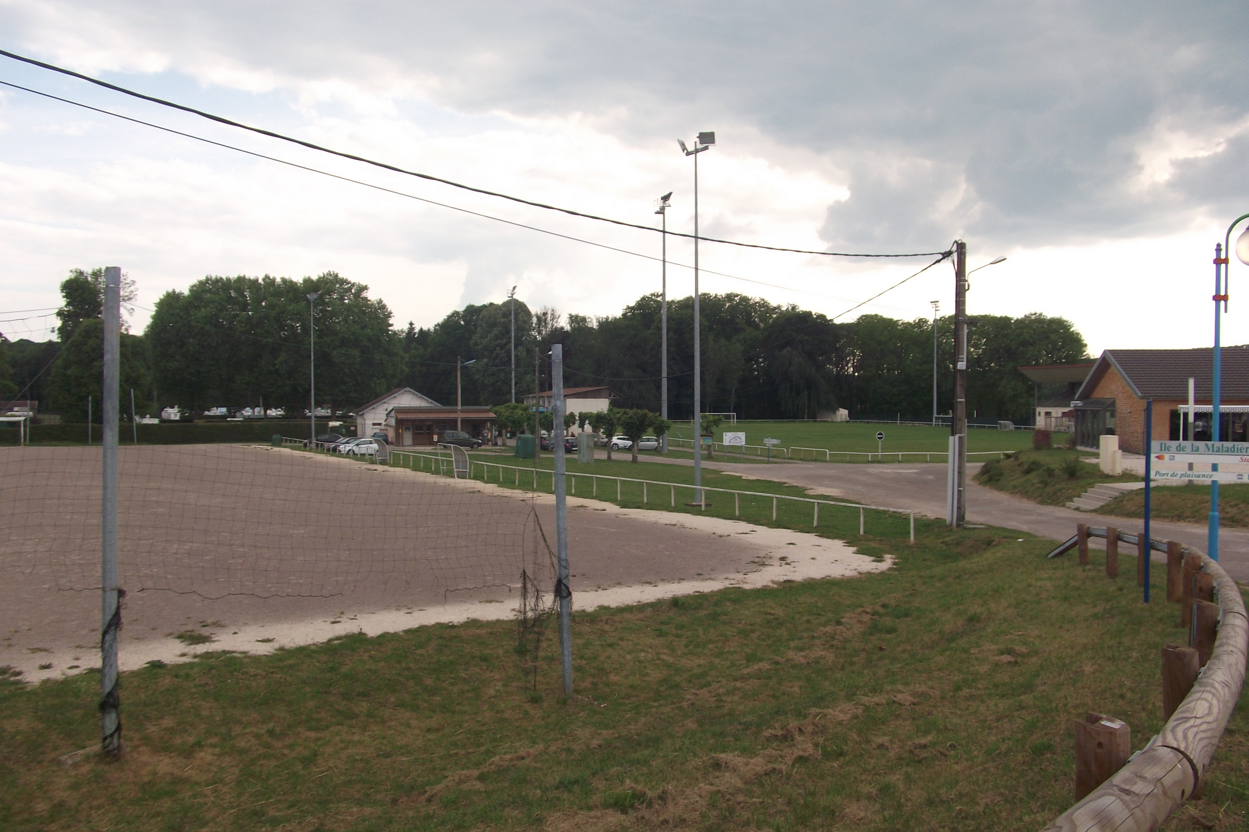 Terrains de football de Port-sur-Saône (Haute-Saône, Franche-Comté)